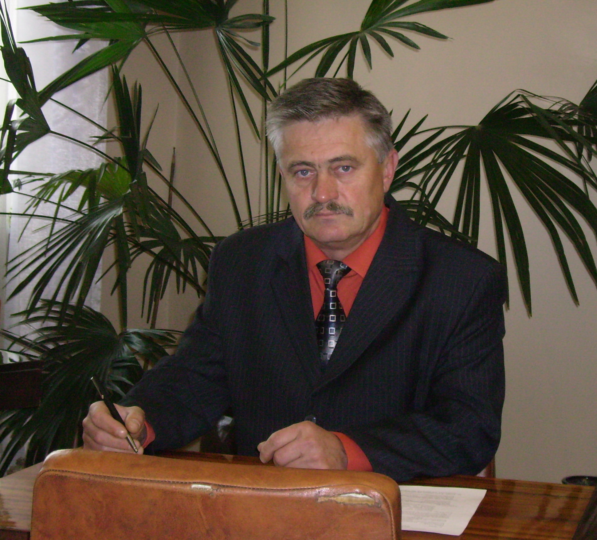 Козловський Микола Павлович.